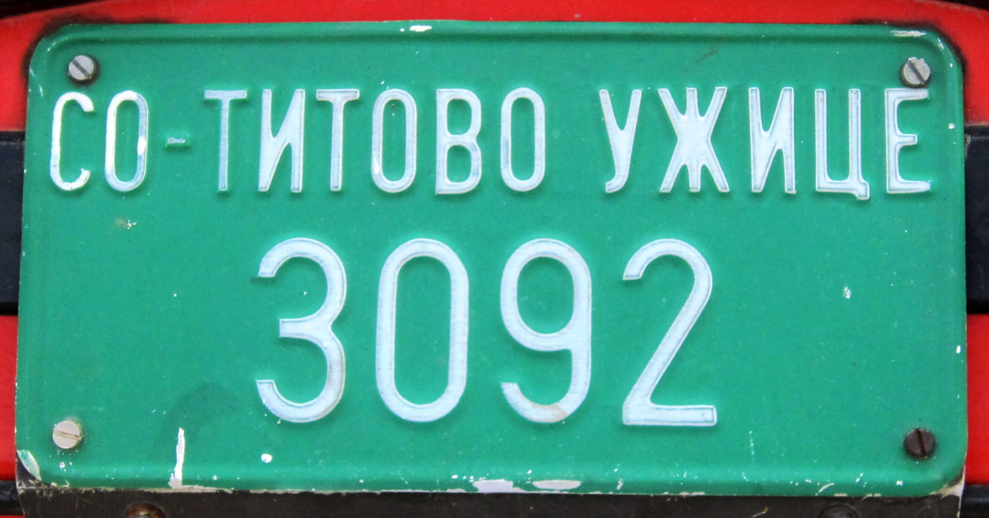 Servië landbouwvoertuig kentekenplaat cyrillisch